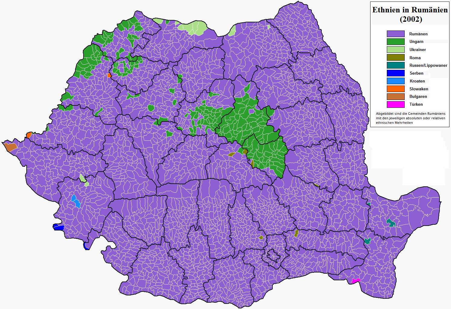 Harta etnica (2002).